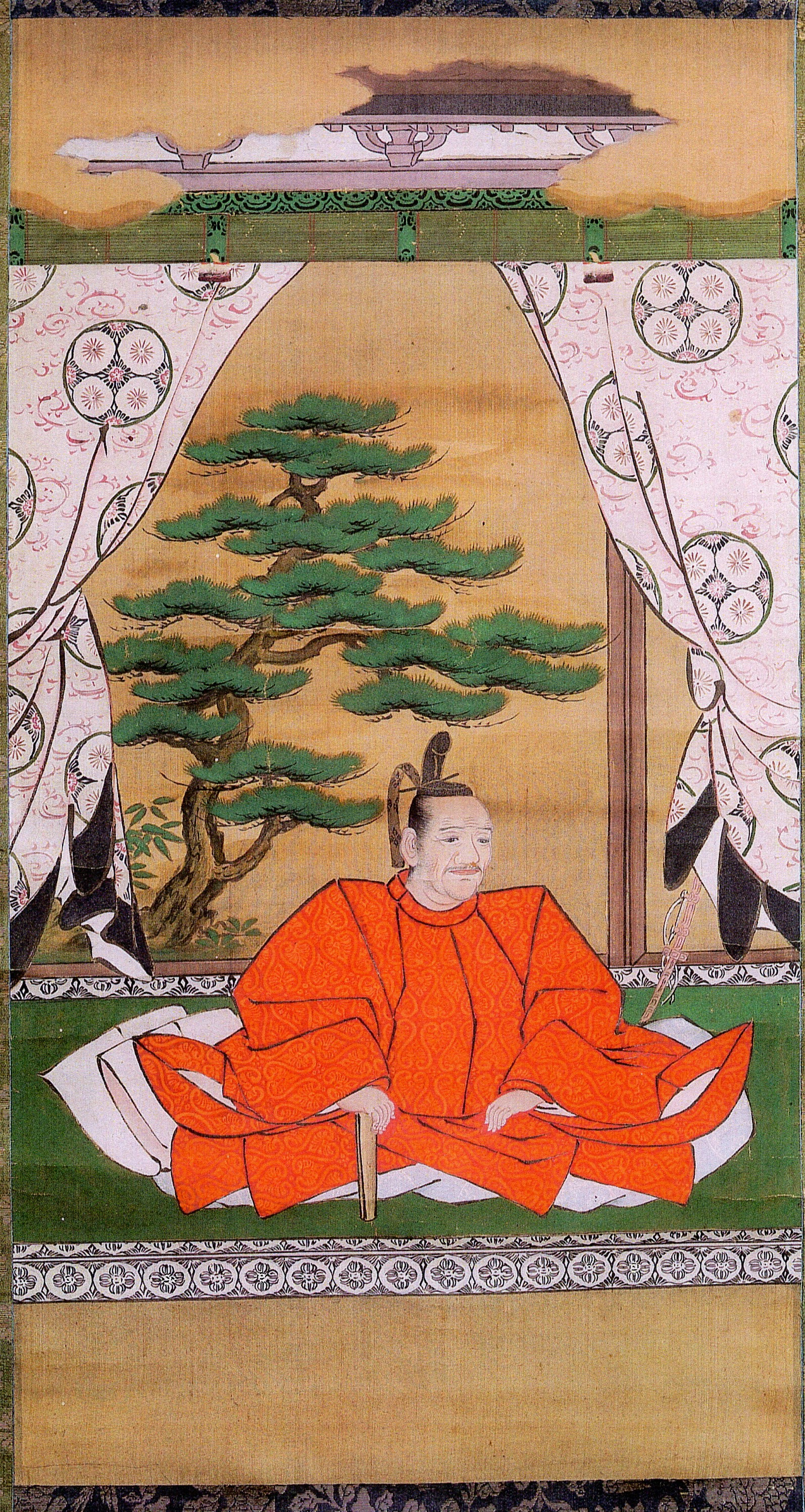 美濃大垣藩主・石川康通の肖像画。